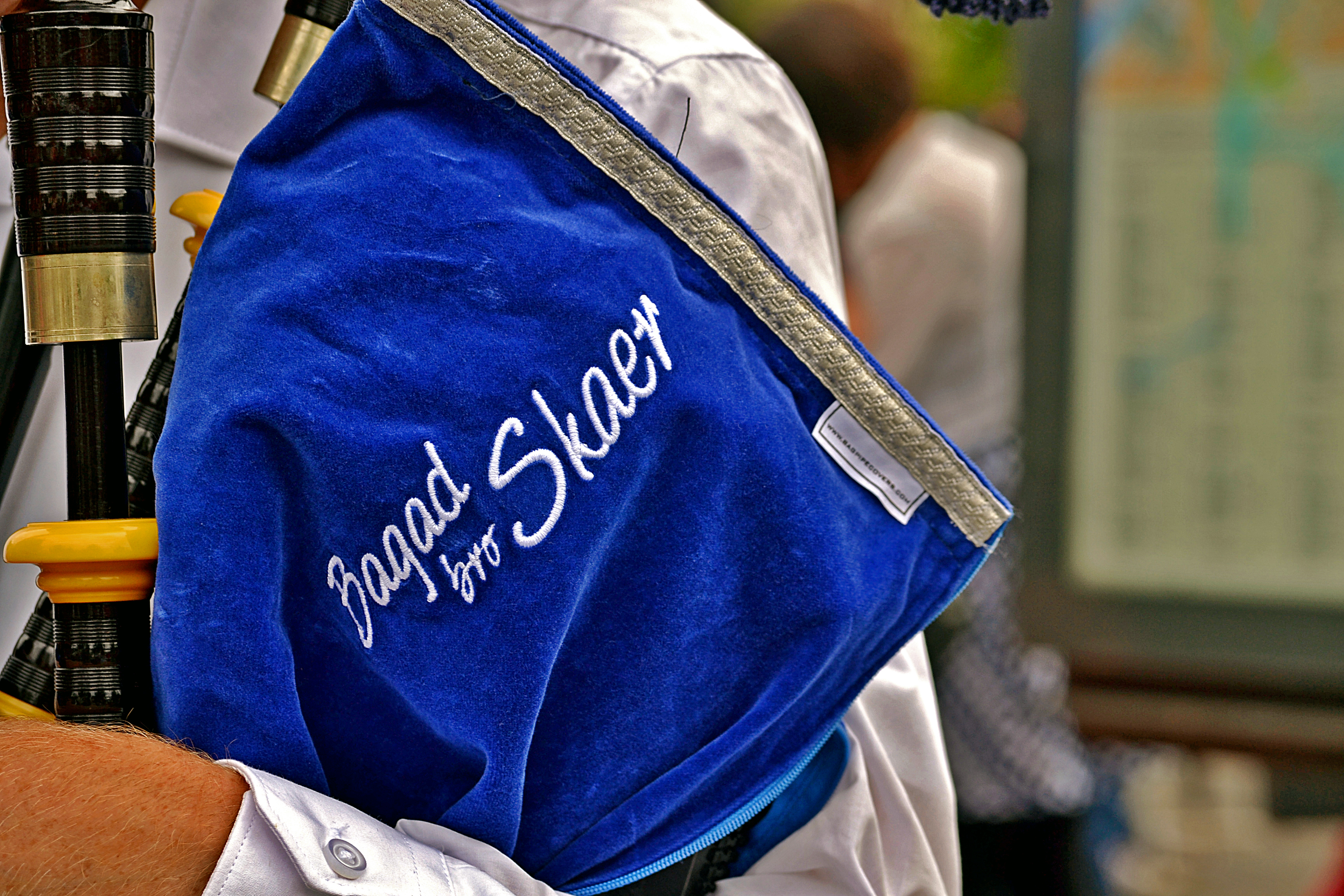 Kemper en Fête, danseurs en costume dans les rues de Quimper pour le festival de Cornouaille le 26 juillet 2015.